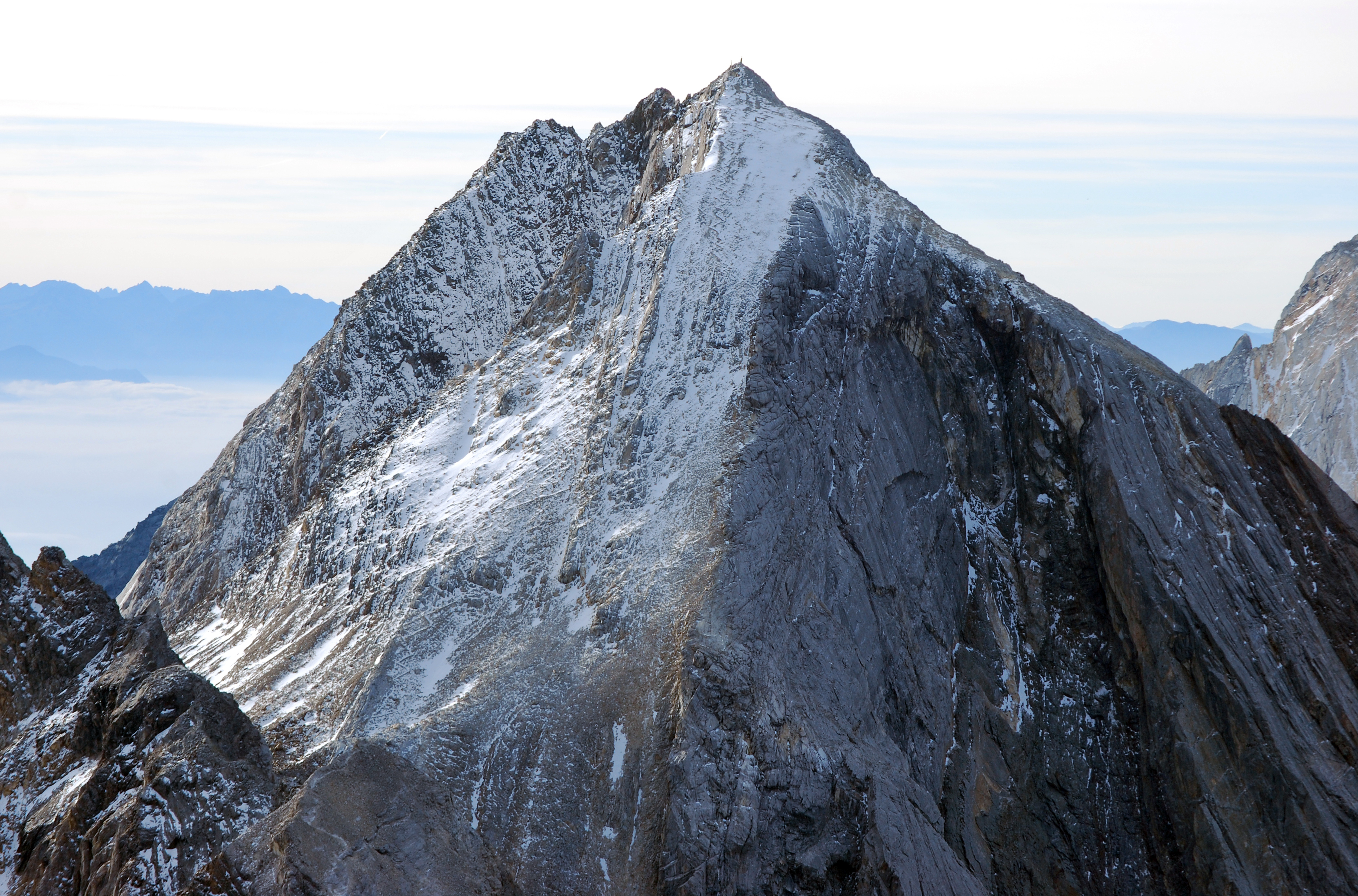 Hochweiße (auch Hohe Weiße) von N (Hochwilde Südgrat)